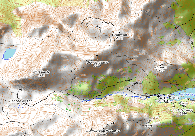 carte réalisée sur umap This map may be incomplete, and may contain errors. Don't rely solely on it for navigation.